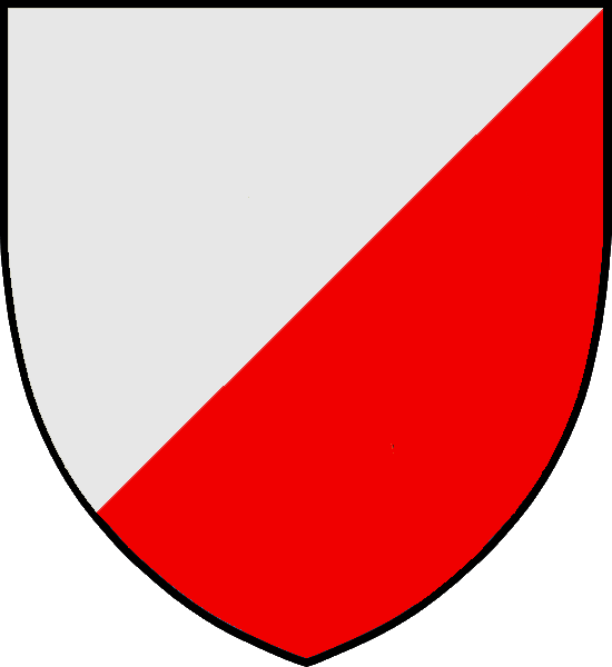 Vapensköld för svenska adelsätten von Dalin